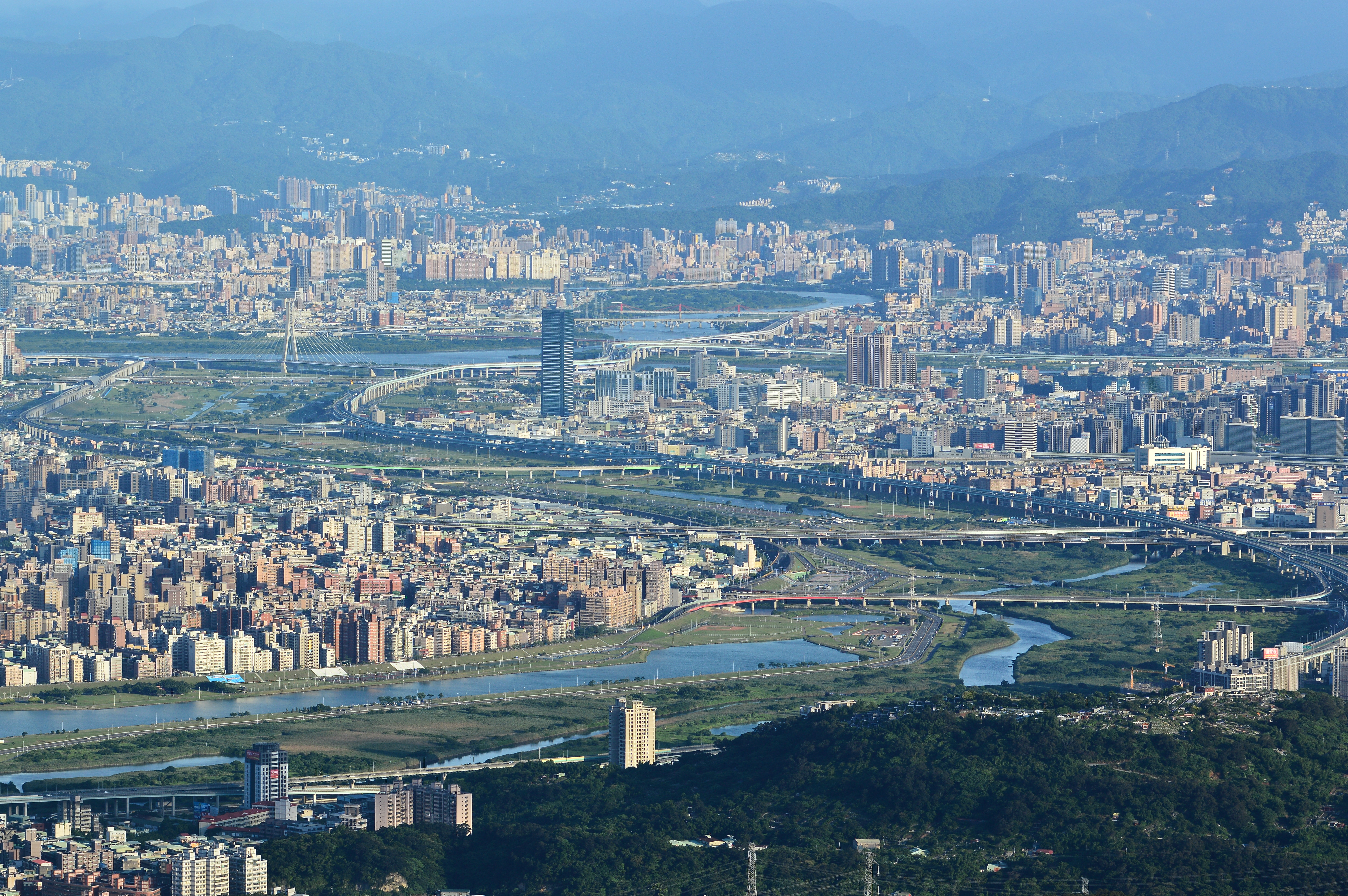 二重疏洪道重要橋梁